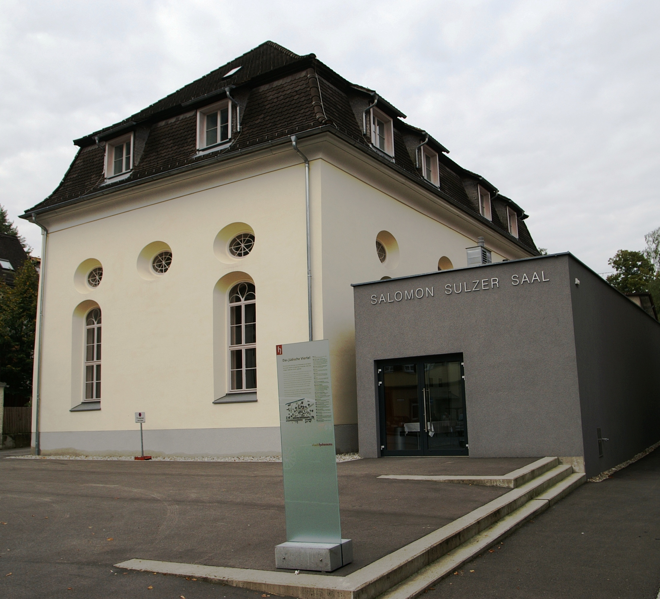 Salomon-Sulzer-Saal 1770 bis 1772 (frühere Synagoge) in Hohenems; Baumeister: Peter Bein. Info Dieses Objekt steht unter Denkmalschutz.